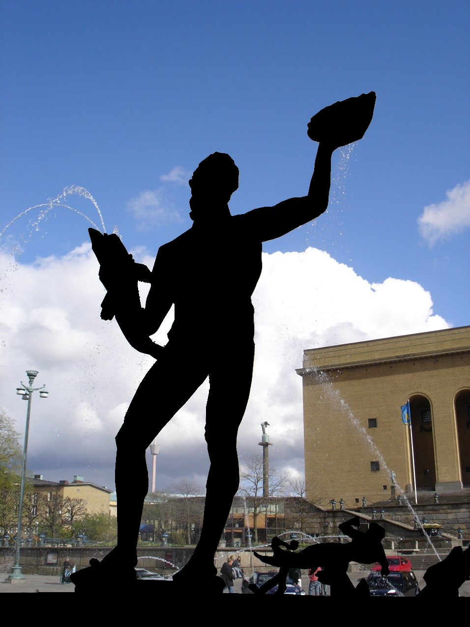 Götaplatsen och Göteborgs konstmuseum.